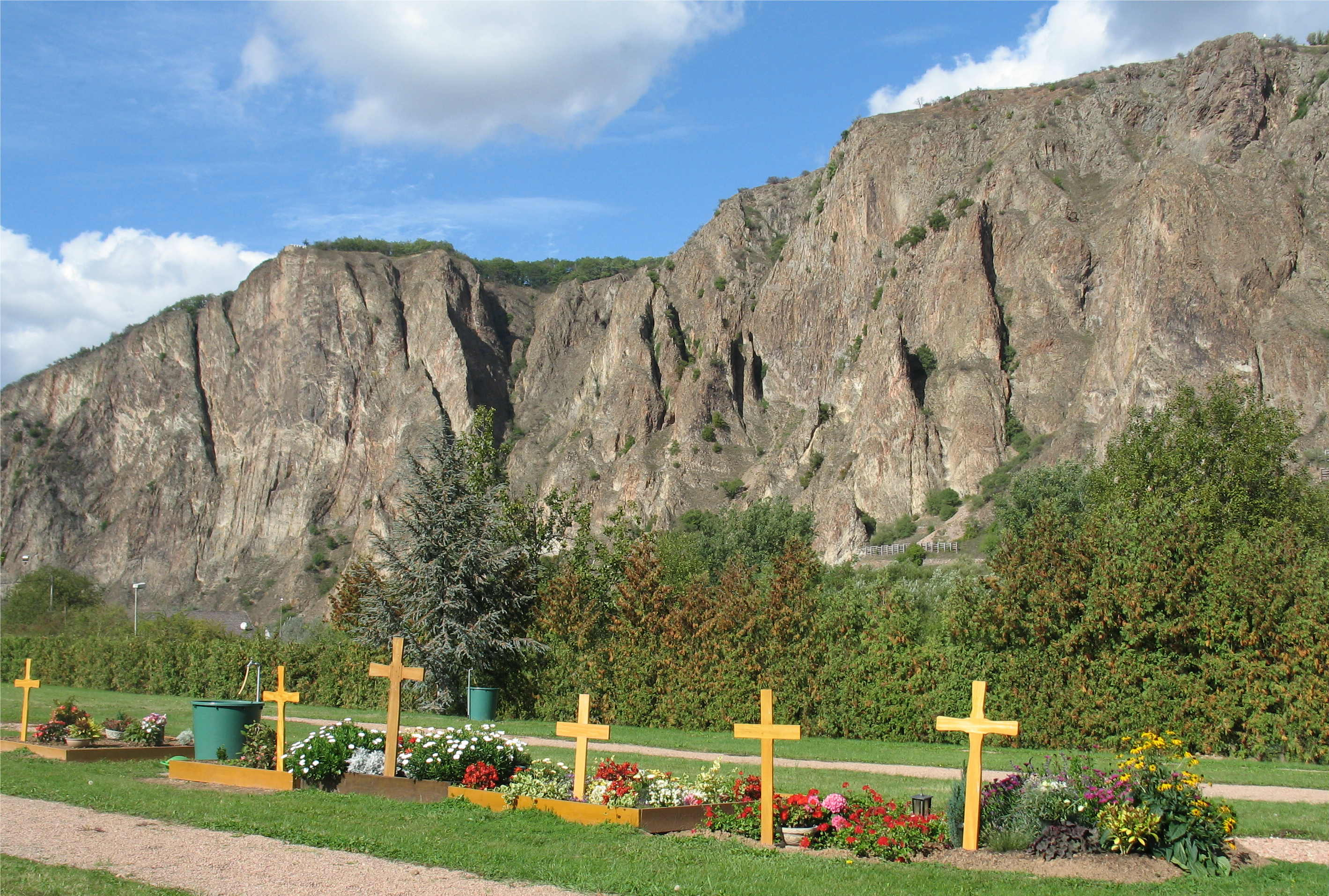 De Rotenfels zu Bad Münster am Stein